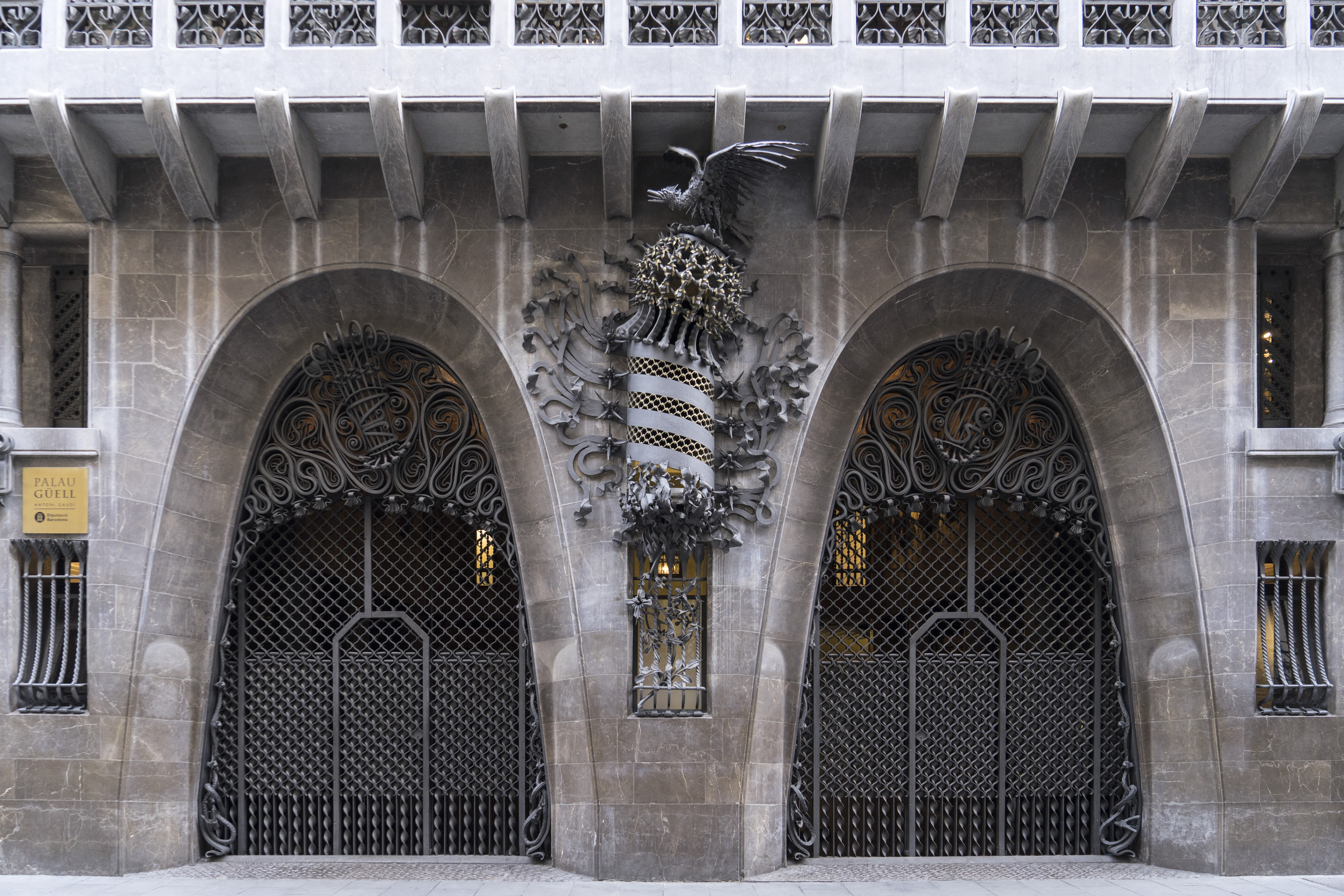 Palau Güell, Antoni Gaudi, Barcelona 1